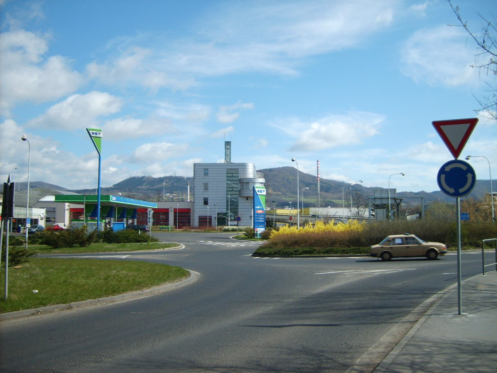 Děčín I-Děčín. Kruhový objezd nedaleko staroměstského mostu, moderní budova integrovaného záchranného systému pro okres Děčín (Provaznická 1394/10), benzinová pumpa Litoměřická.